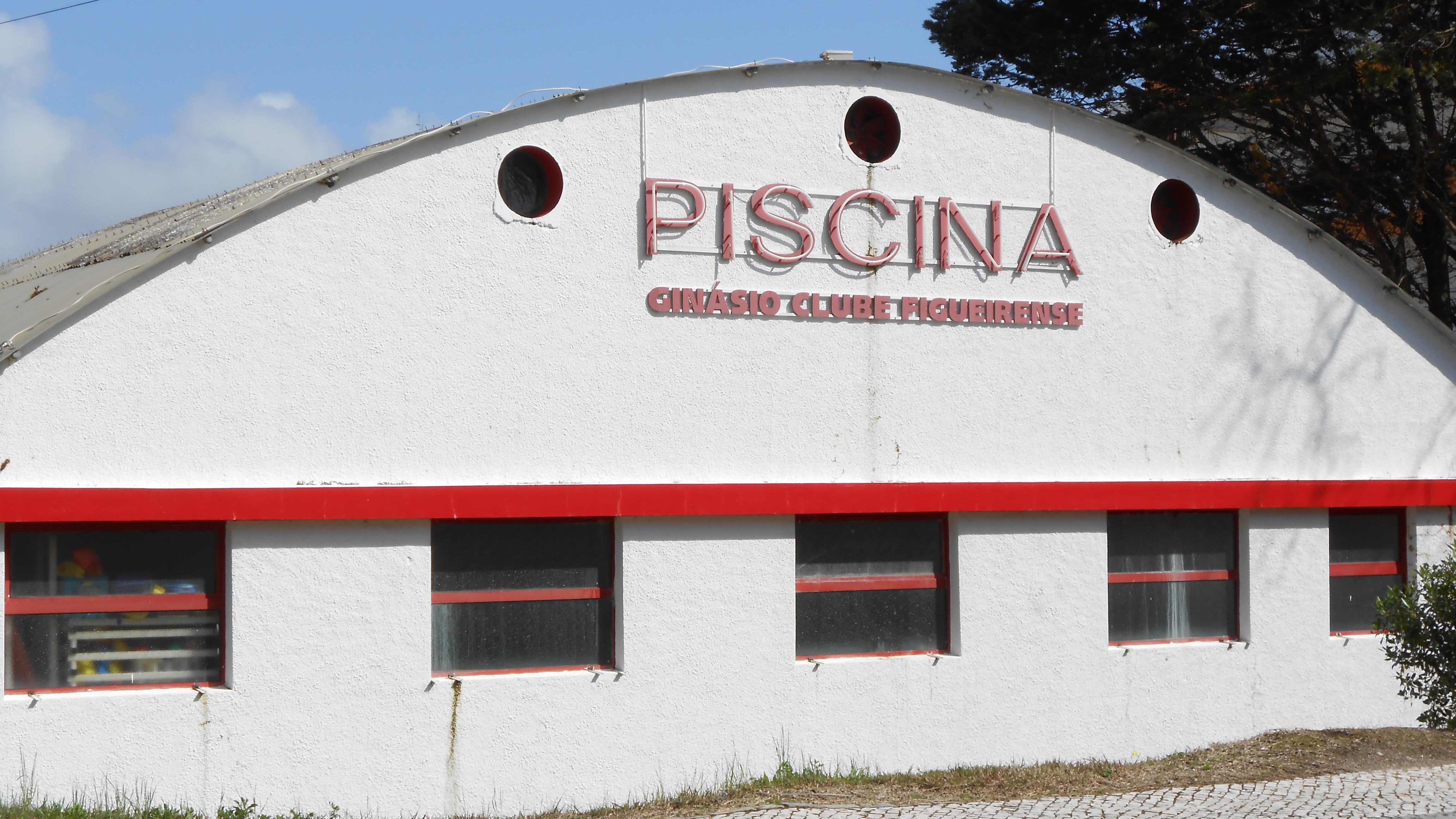 Die Schwimmhalle des Ginásio Clube Figueirense, in Figueira da Foz.